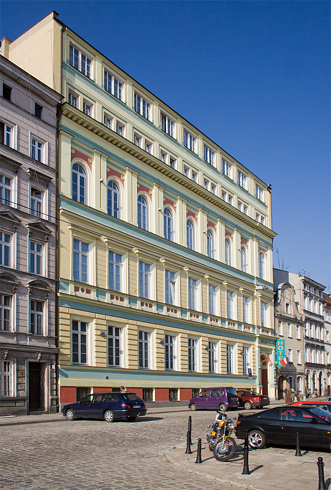 Hotel "Centrum Dikul" przy ul. Cieszyńskiego